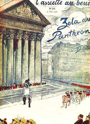 Auteur du dessin : Georges d'Ostoya (1872-1937), paru dans le journal L'Assiette au beurre, 30 mai 1908, numéro 374 Image trouvée sur le site de L'Assiette au beurre Note de Inocybe : Le webmetre interrogé sur le statut de l'image répond à mon courriel : « Je pense que d'ostoya n'est pas protégé par des droits d'auteur. En tout cas il ne figure pas dans la liste de l'ADAGP. » Ce dessin datant de 1908, je pense donc qu'il est du domaine public.